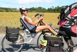 Mujer corriendo en una bicicleta reclinada en Currituck, NC. Octubre 2007